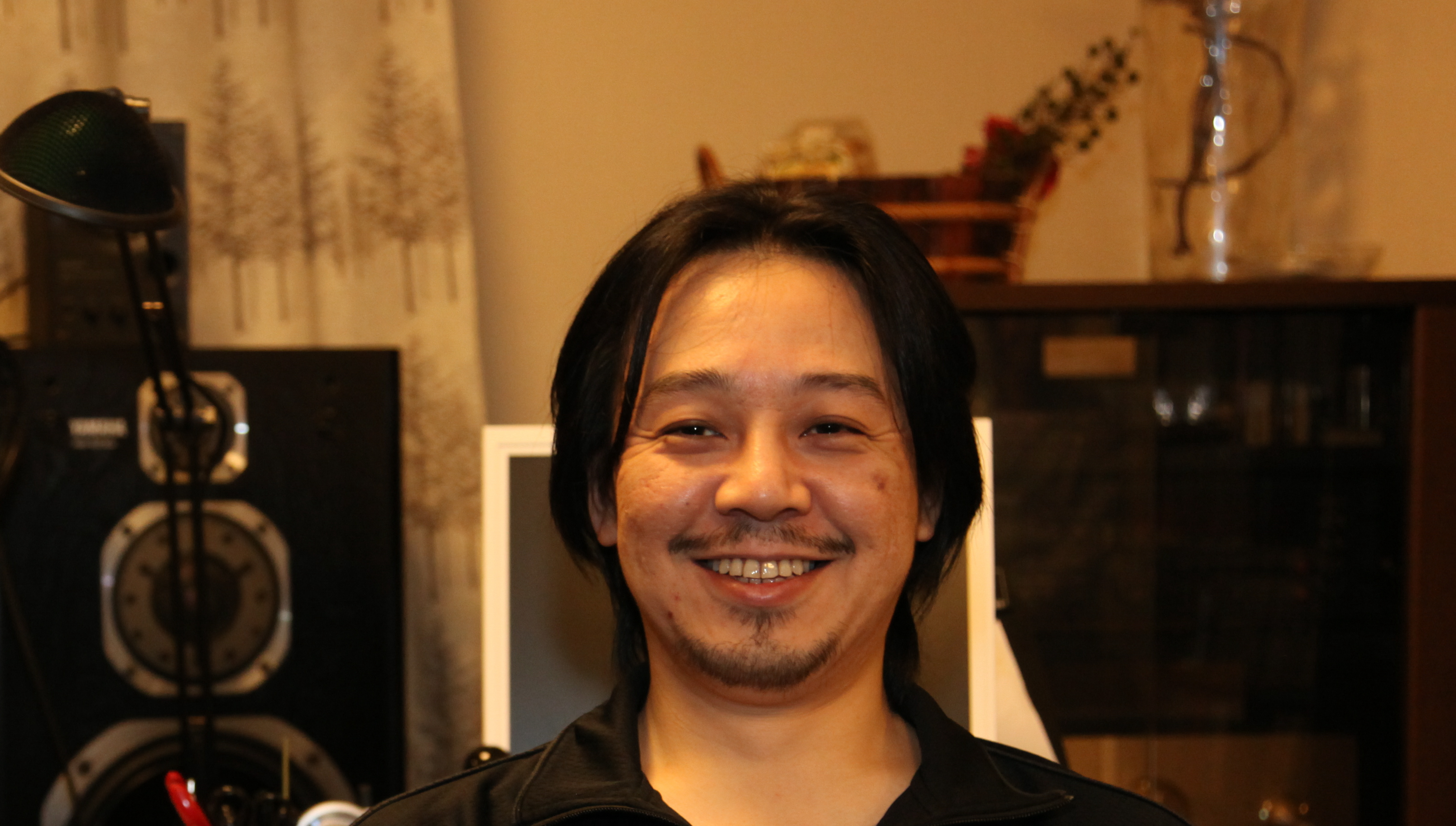 崎元仁